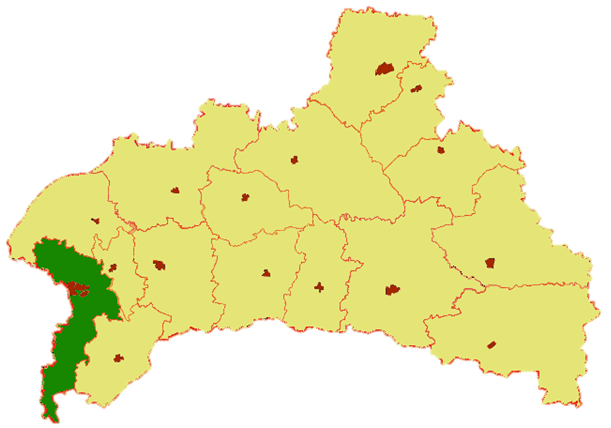 Brestský rajón v rámci Brestské oblasti